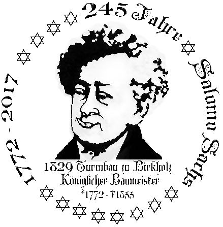 Stempelentwurf des Fördervereins Dorfkirche Birkholz e. V. 245 Jahre Salomo Sachs im Jahr 2017. Zum Gedenken an den königlichen Regierungsbauinspektor und seinem Turmbau 1829 zu Birkholz Bernau bei Berlin. Der einzige jüdische Architekt im preußischen Staatsdienst seiner Zeit.